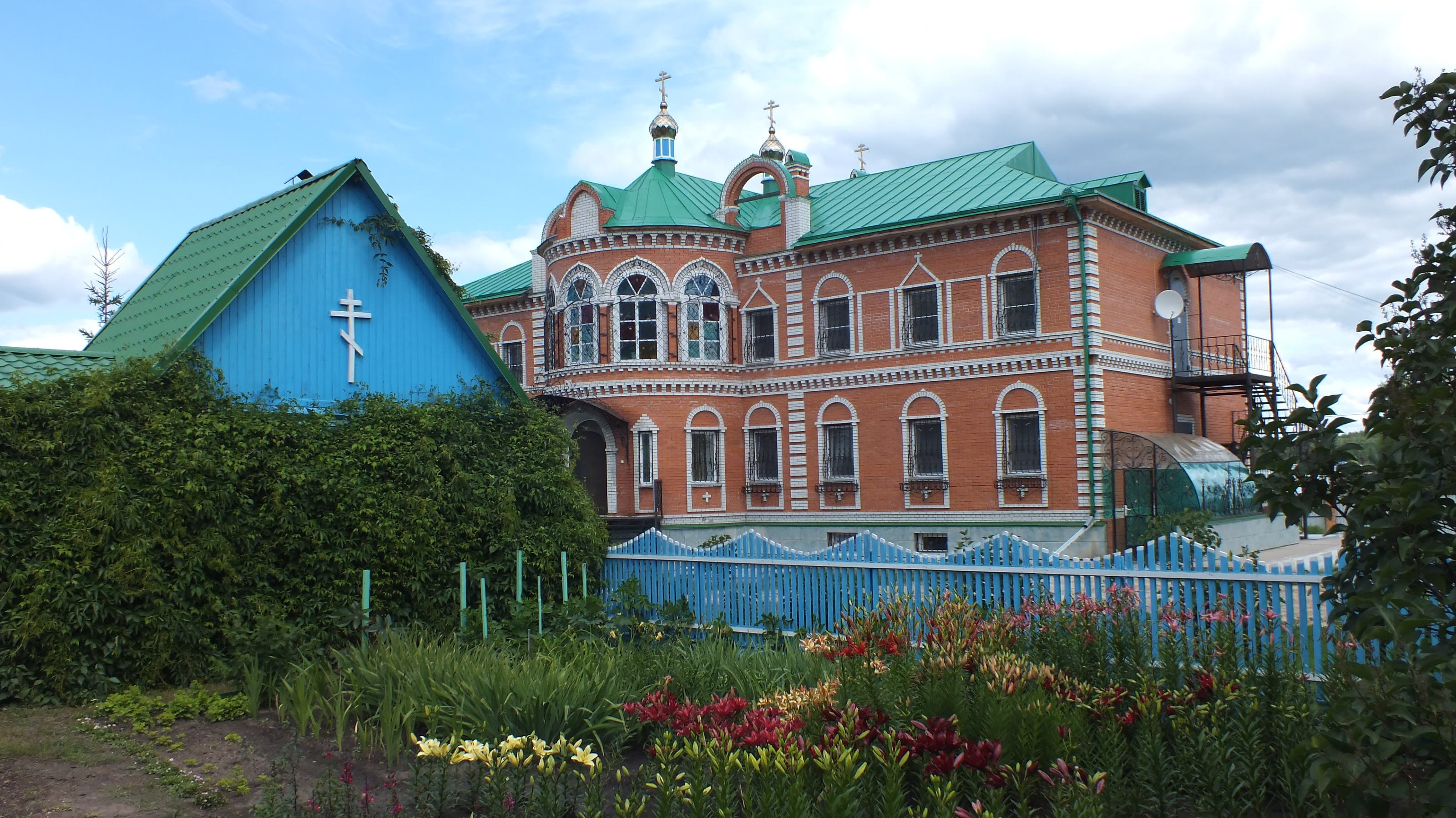 Belozersky District, Kurgan Oblast, Russia